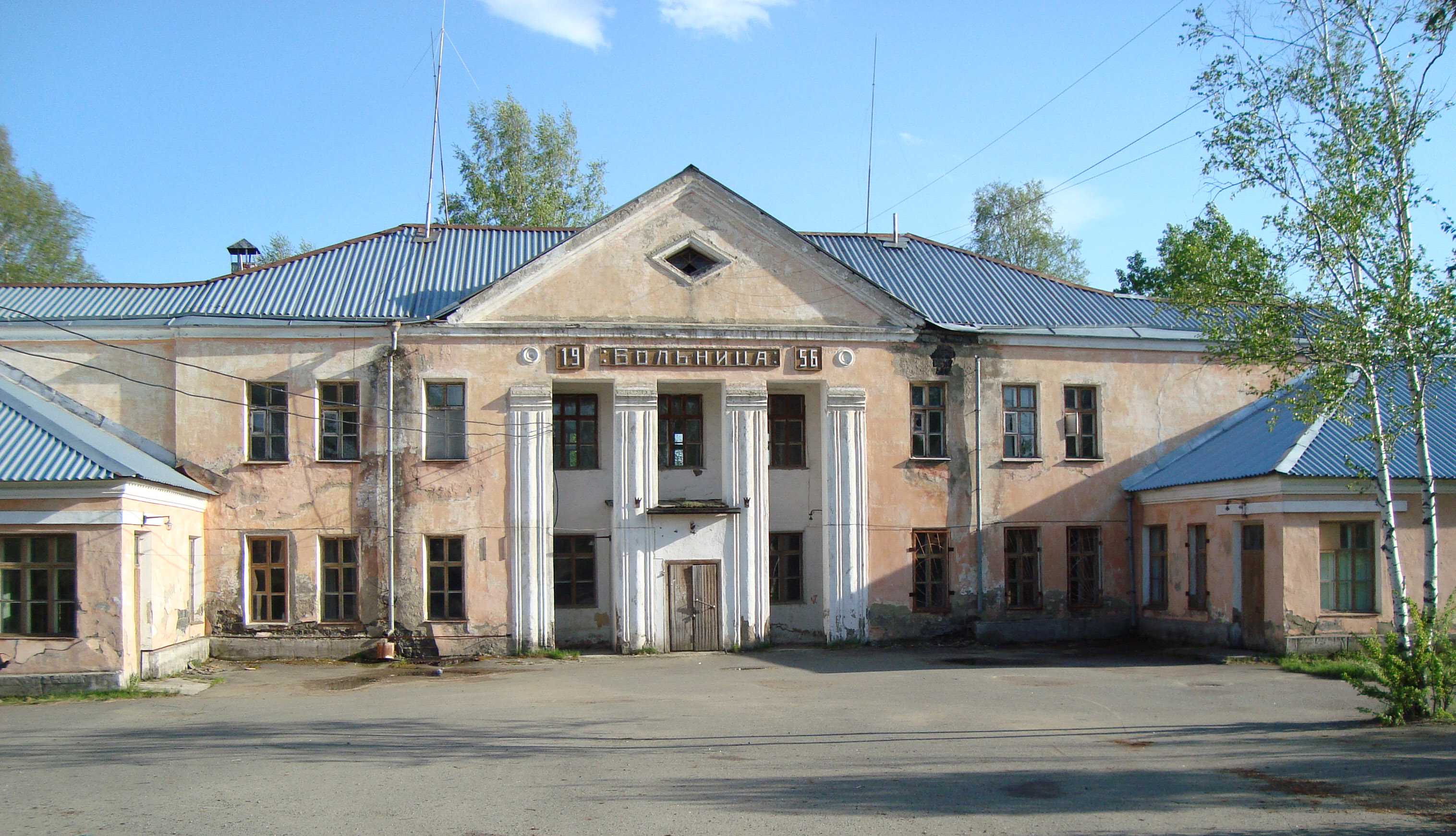 Больница поселка Рудничного